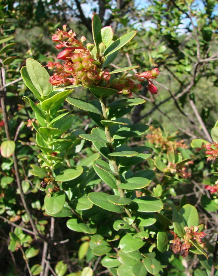 Gaylussacia brasiliensis - ERICACEAE - Parque Nacional da Chapada Diamantina - Palmeiras - Bahia - Brasil.